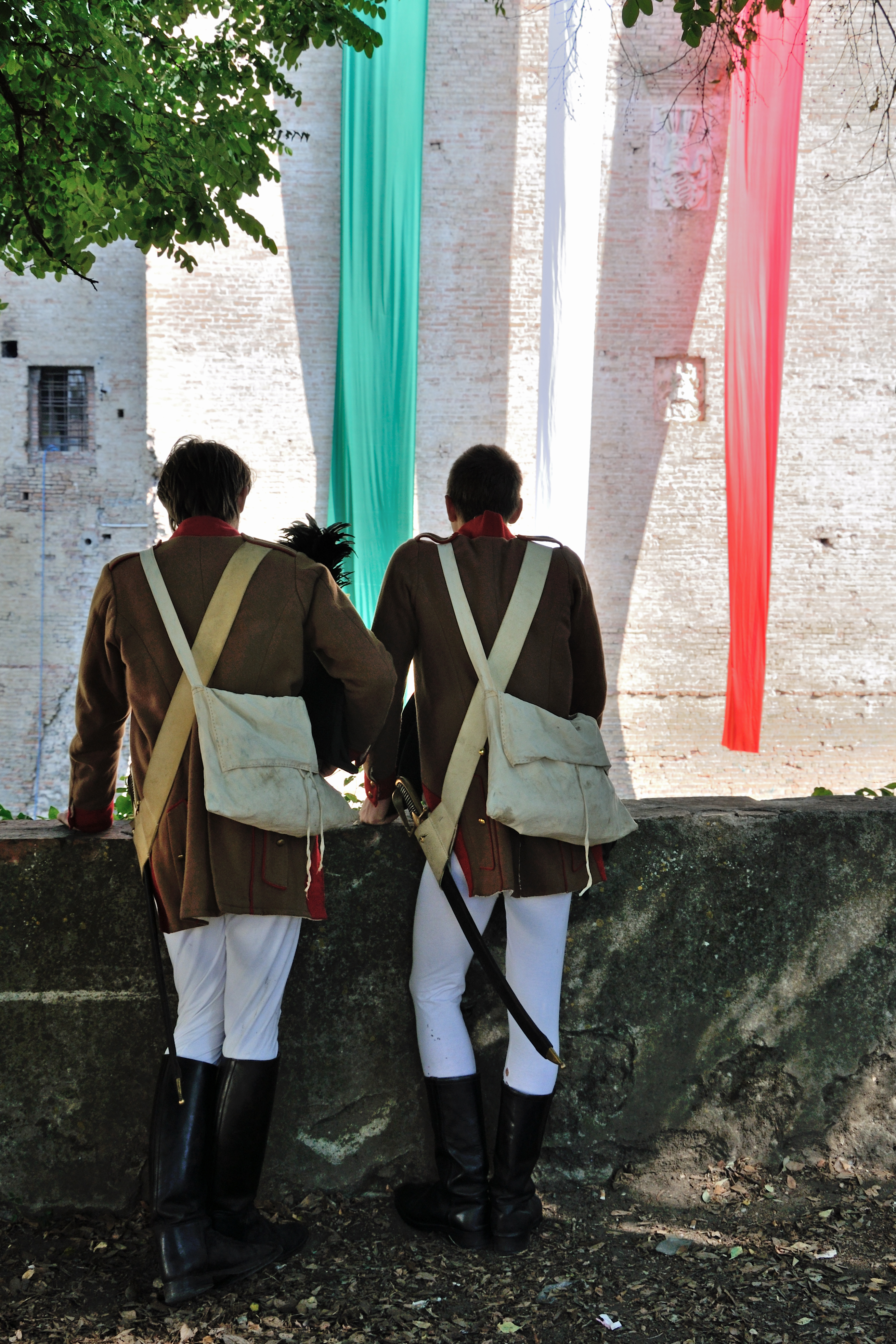 Due soldati attendono l'inizio della Rievocazione Storica della Battaglia di Montechiarugolo - Montechiarugolo (PR) Italia - 2 Ottobre 2011